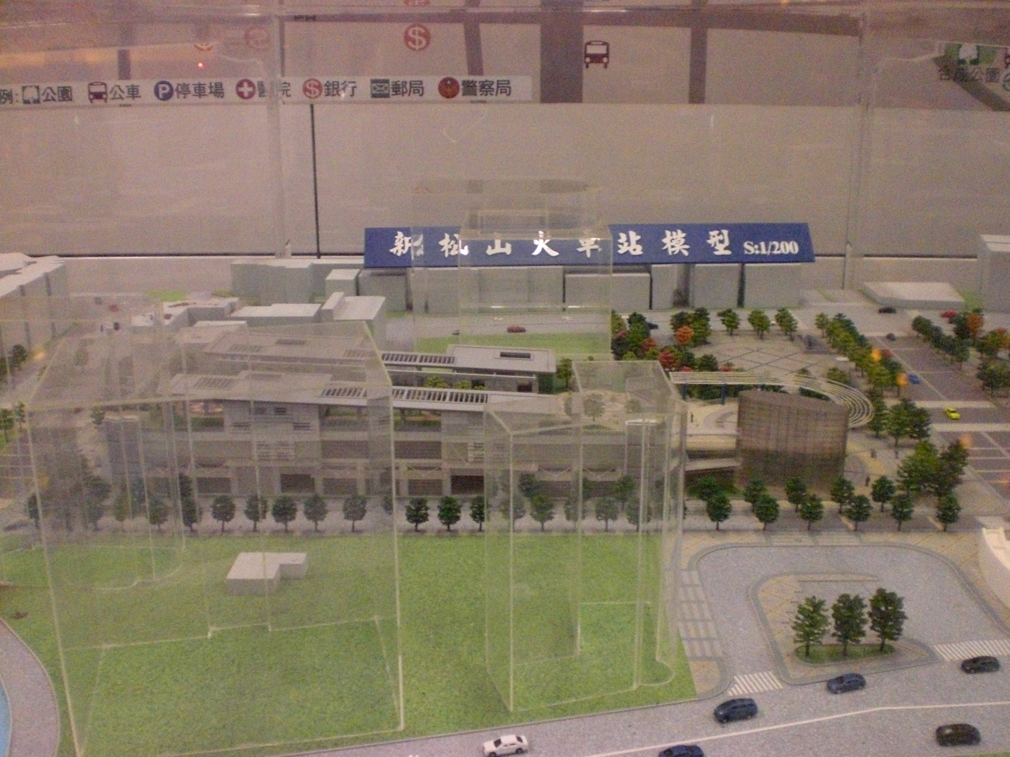 松山車站地下一樓，新松山火車站比例模型前端外觀近照，比例為兩百分之一。此為原始設計，現已變更並改建為聯合開發大樓。